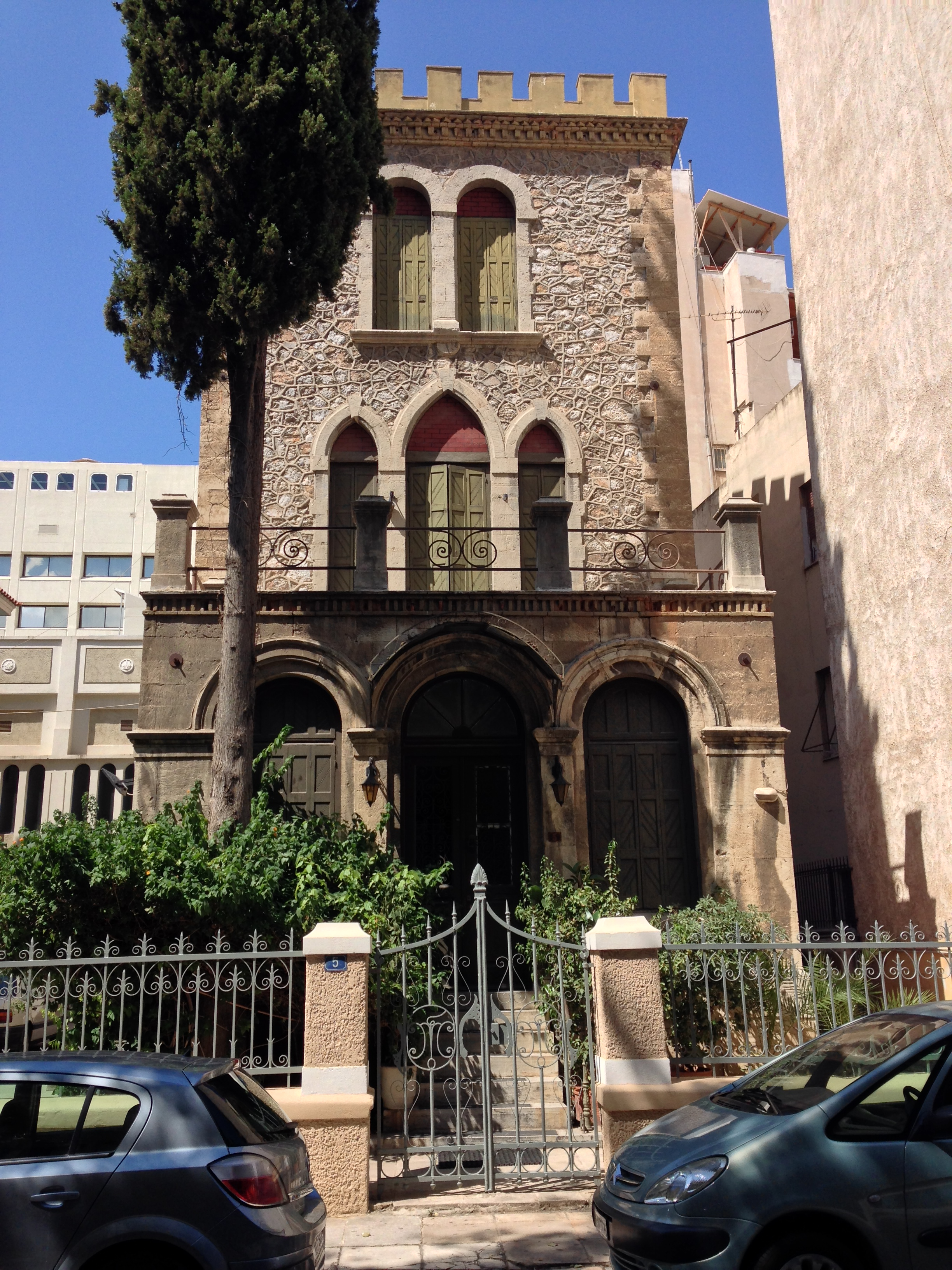 Old Athens - Πύργος Μαυρομιχάλη (1900)